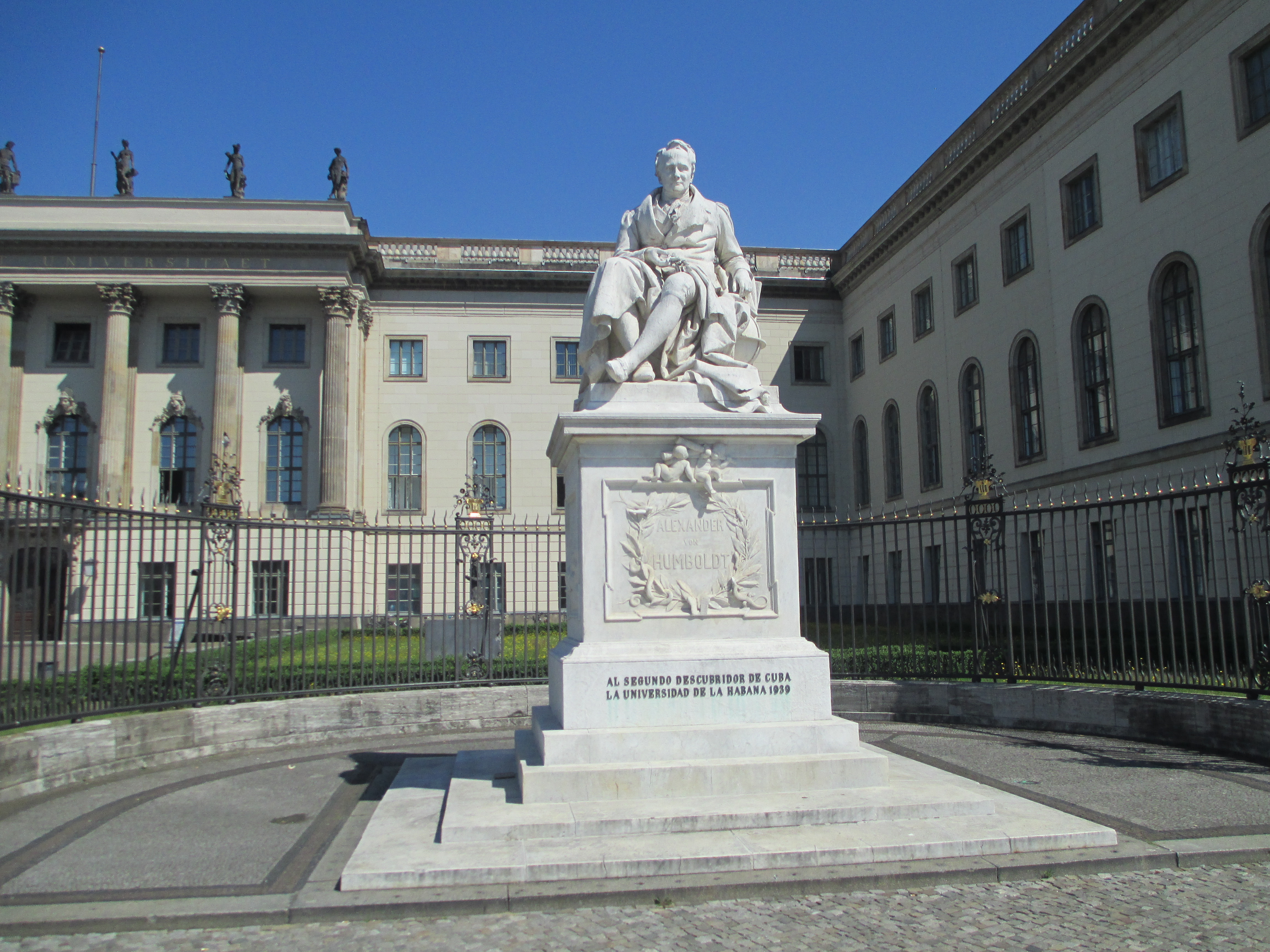 פסל של אלכסנדר פון הומבולדט